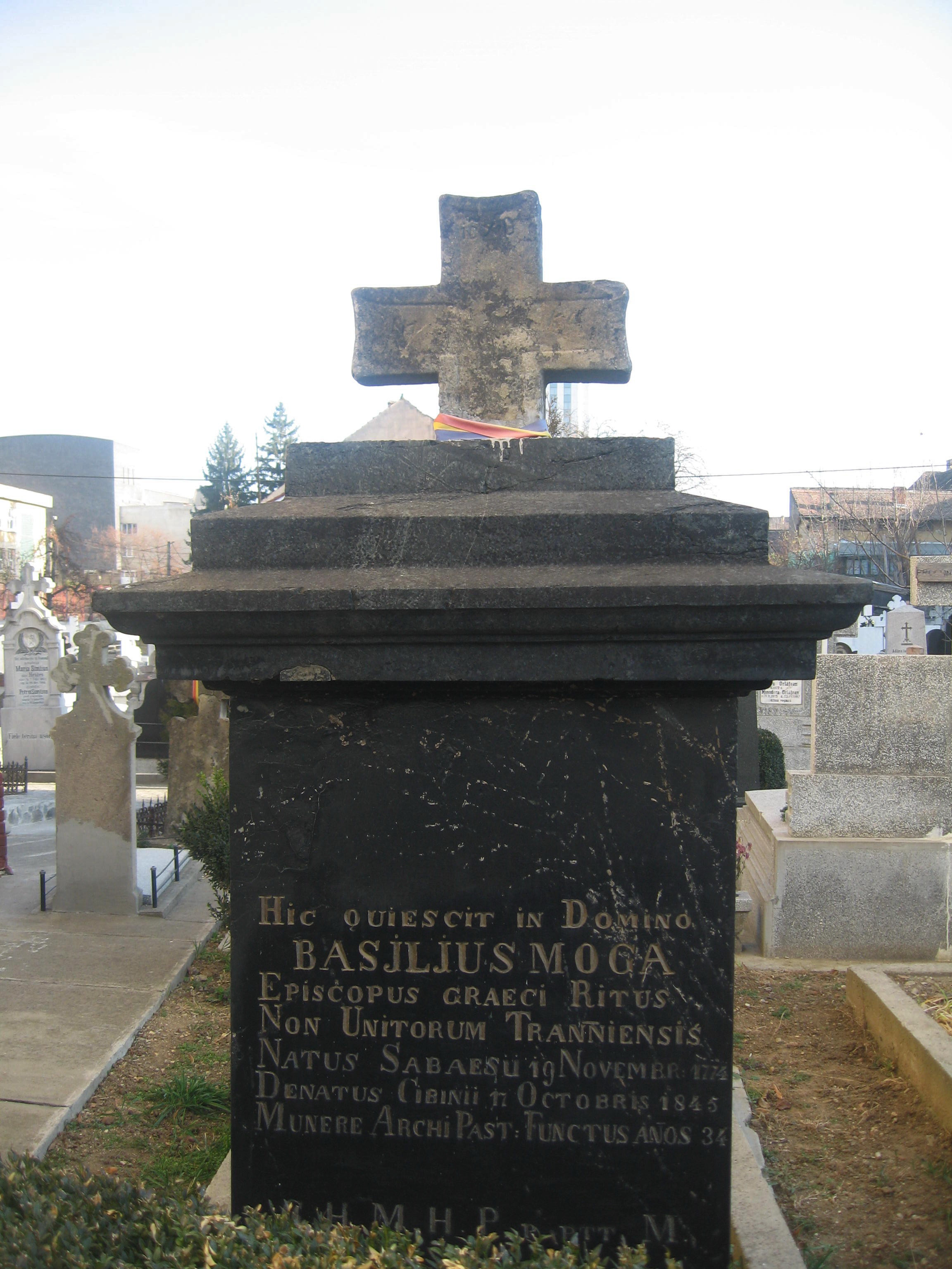 Cimitirul bisericii "Buna Vestire” - din Groapă din Sibiu 03